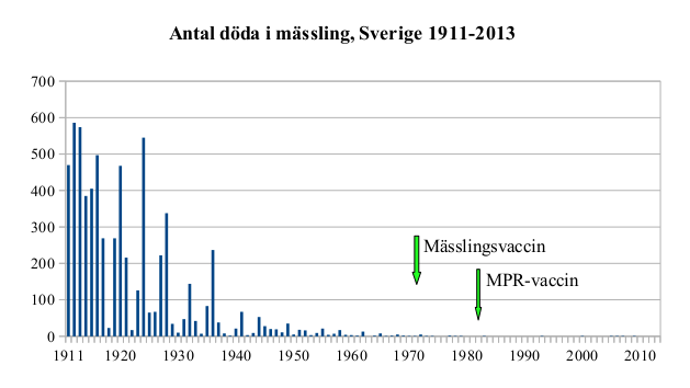 Antal döda i mässling i Sverige 1911 - 2013. Dödligheten minskade kraftigt under första hälften av 1900-talet. Uppgifter från Sveriges officiella statistik, publikationen Dödsorsaker, utgiven av Statistiska centralbyrån till 1993, från 1994 av Socialstyrelsen.